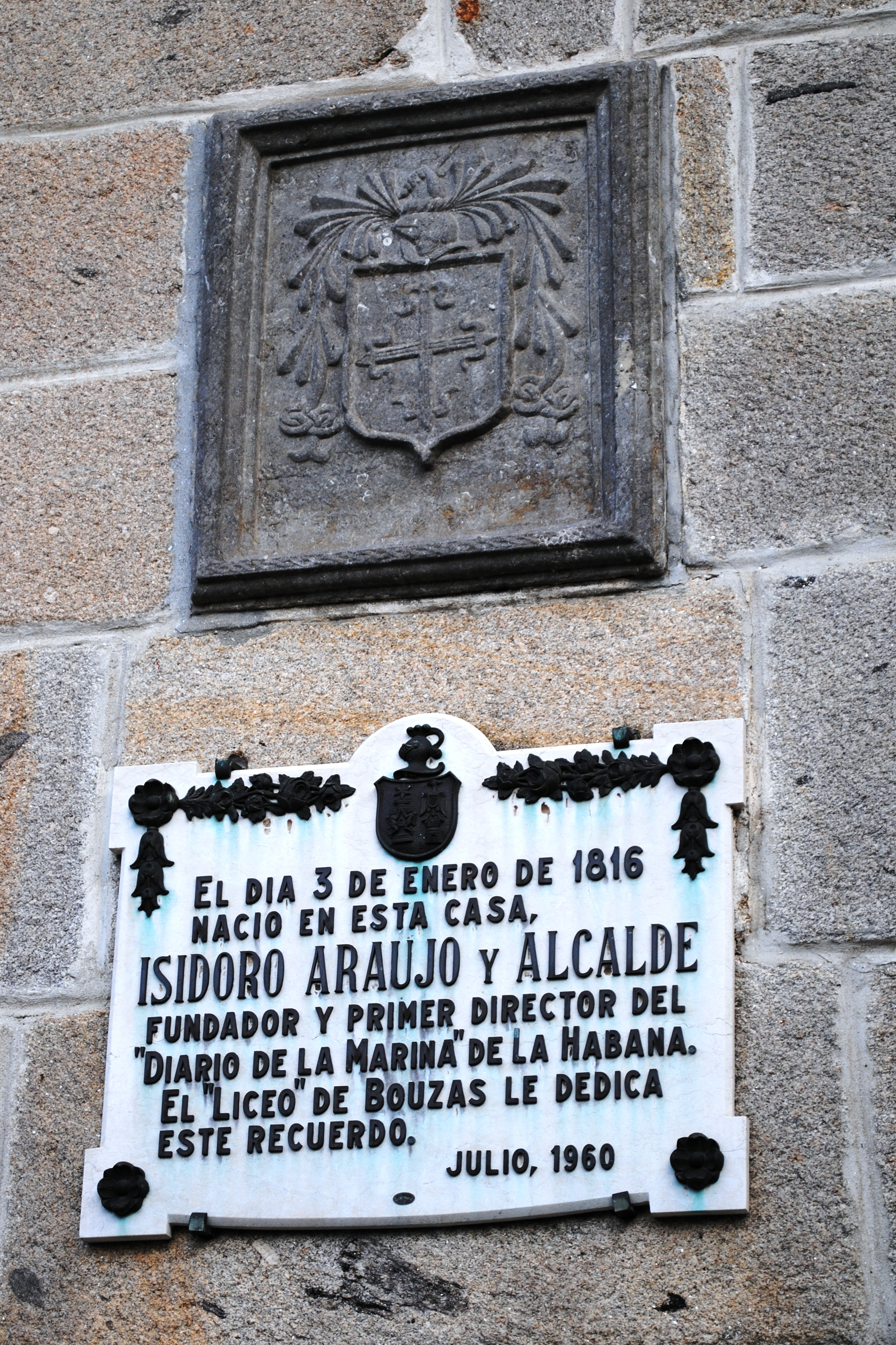 Isidoro Araujo y Alcalde, Bouzas